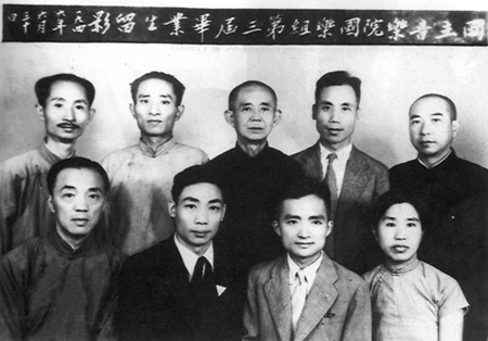 中文（香港）: 1949年国立音乐学院国乐组第三届毕业生合影，后排左二为杨荫浏